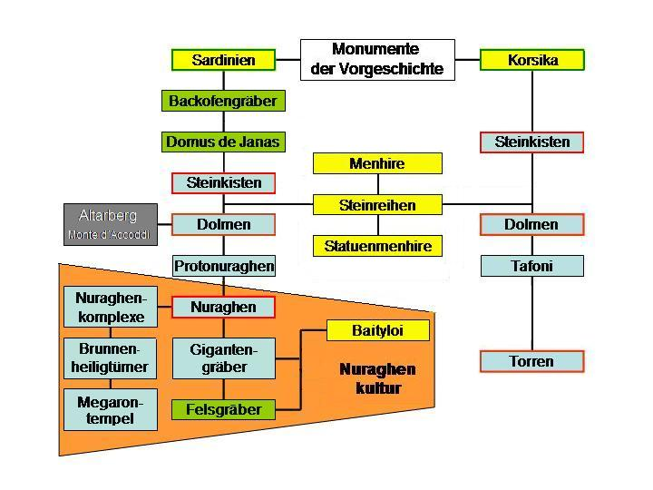 Sard.-Kors. Typen